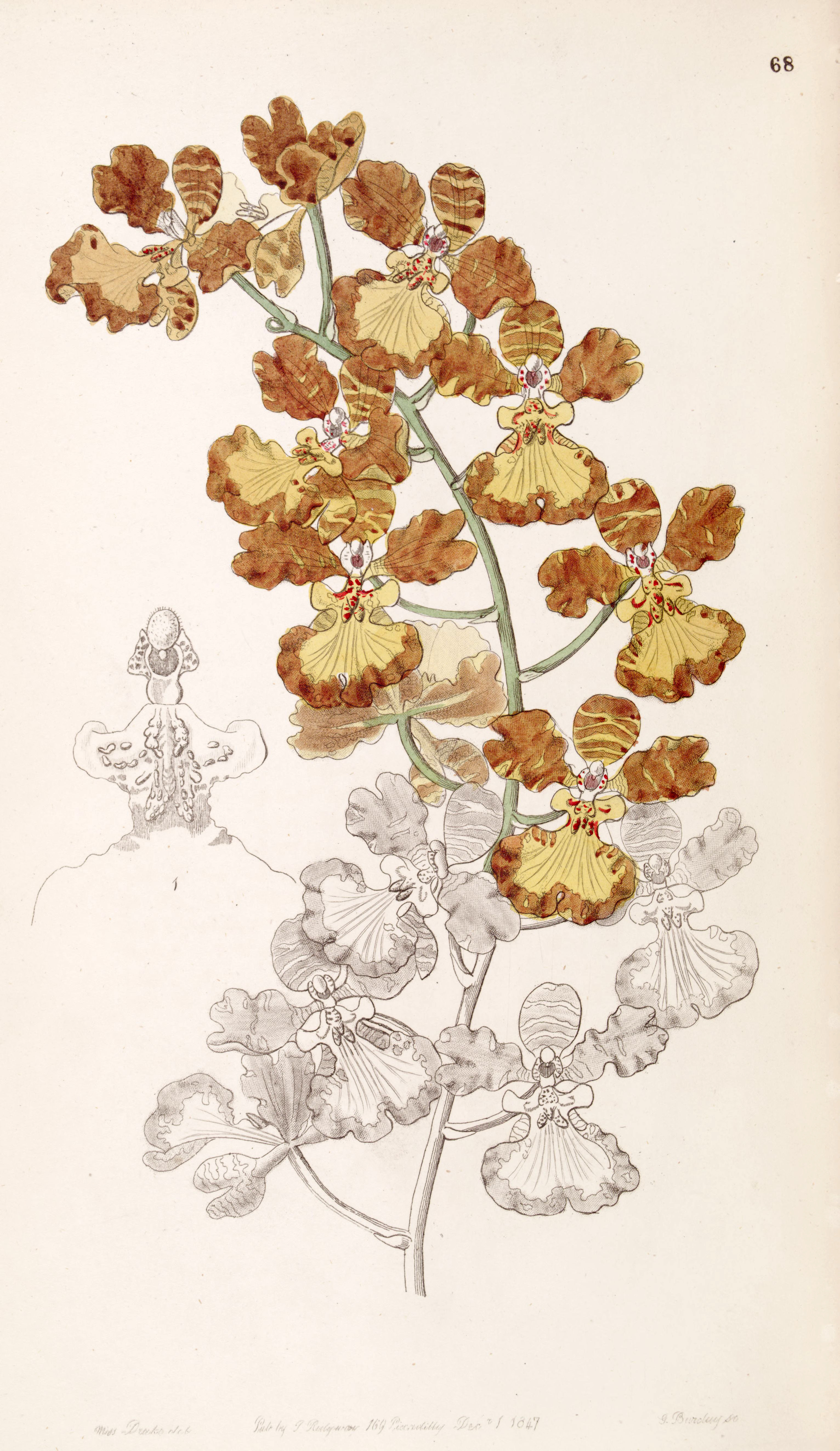 Oncidium gardneri (as syn. Oncidium curtum)